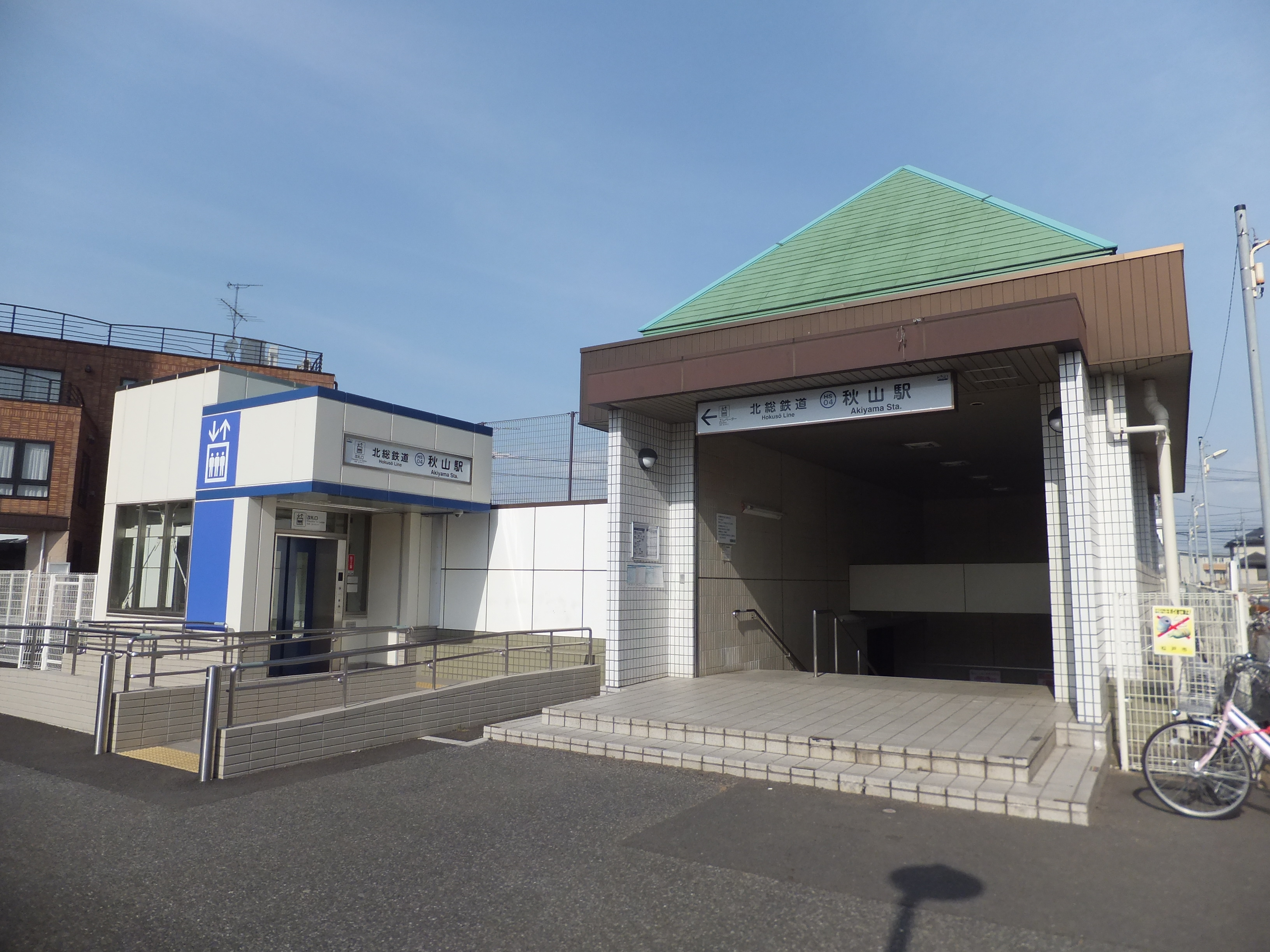 北総鉄道秋山駅入口